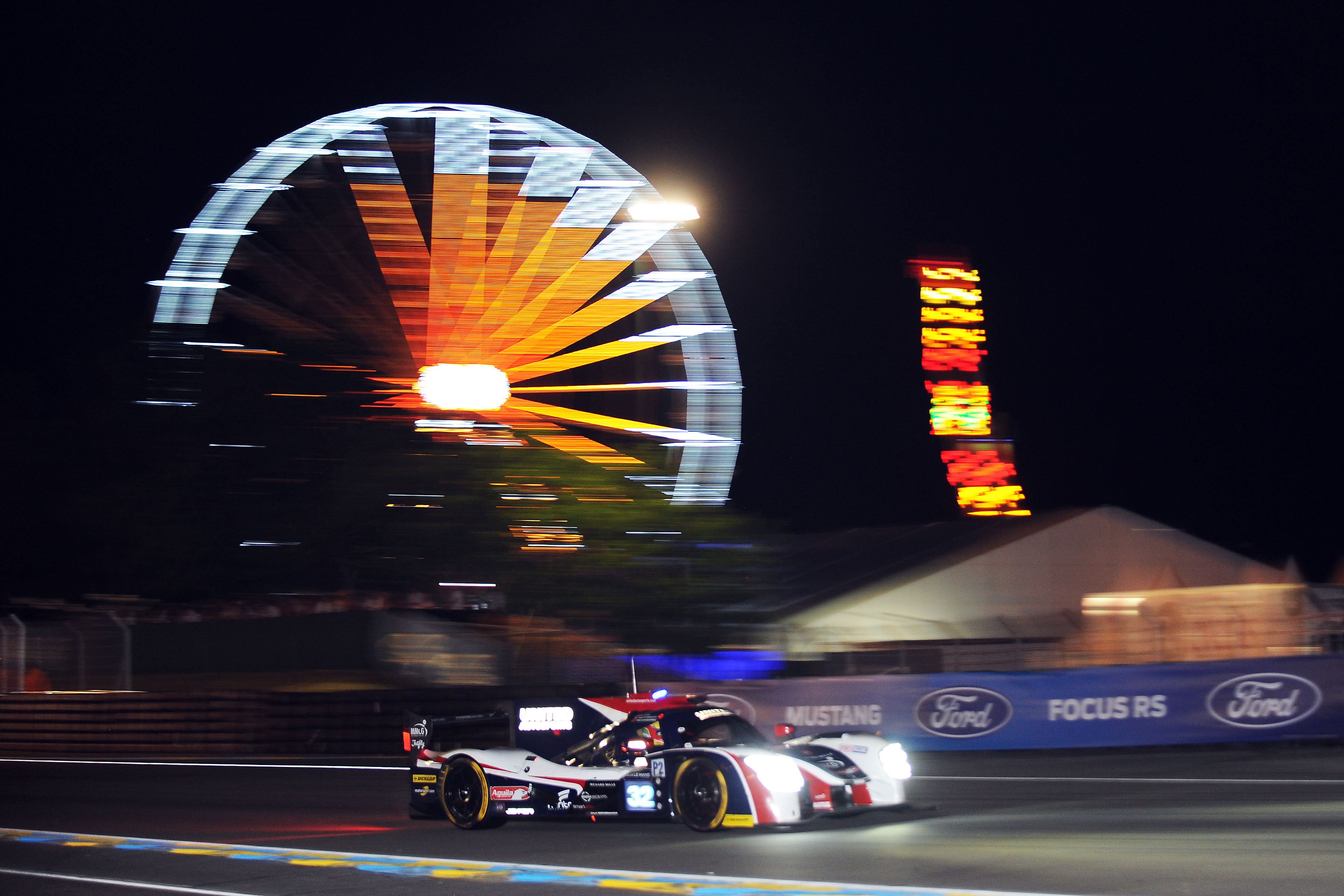 United Autosport lors des 24 Heures du Mans 2017.